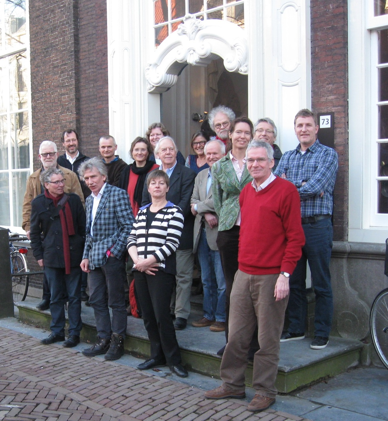 Oprichters MENSenSTRAAT in Delft